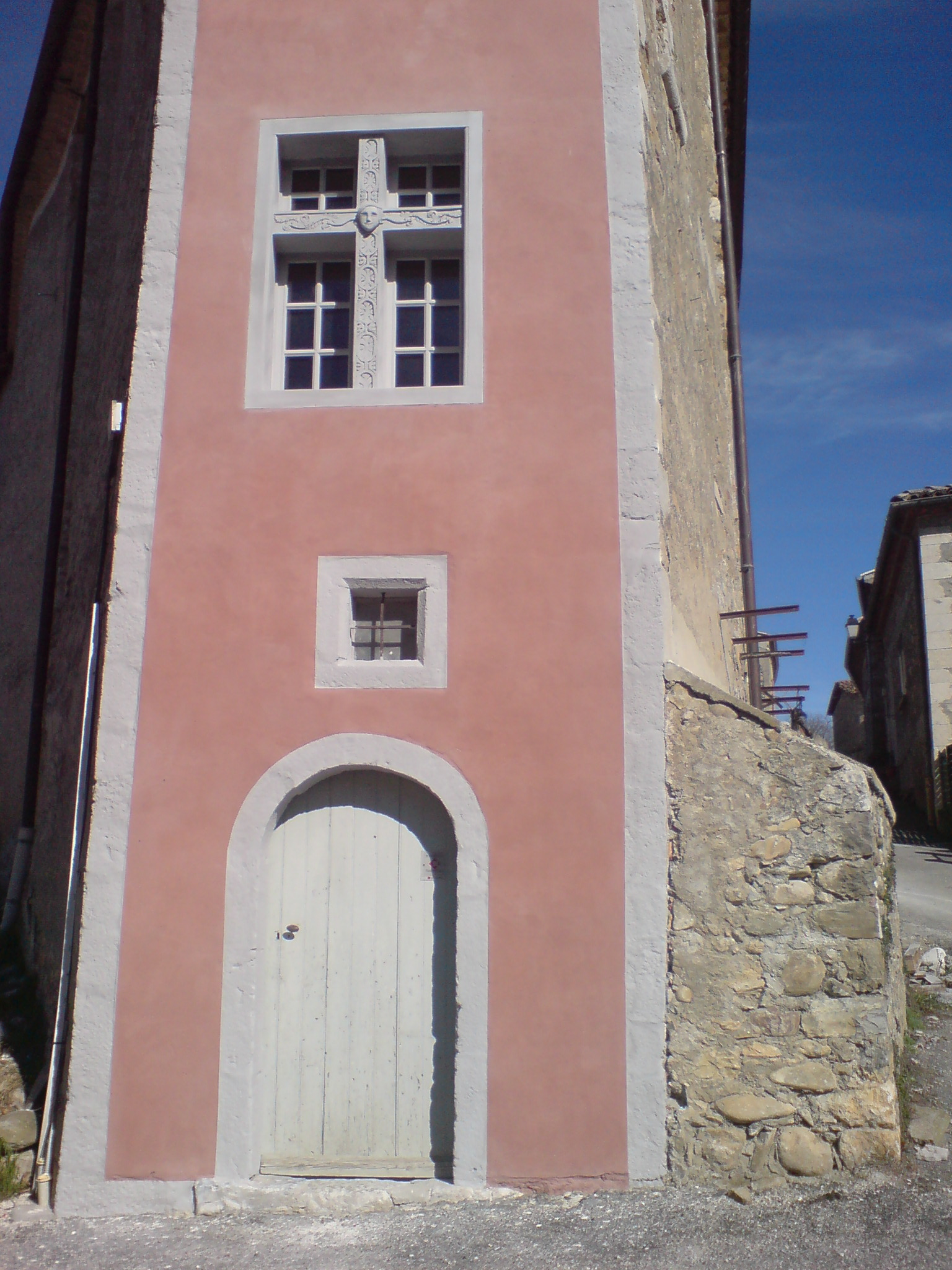 Façade d’une maison de Valernes, réalisé par Philippe Bertone, Les Ateliers du Paysage